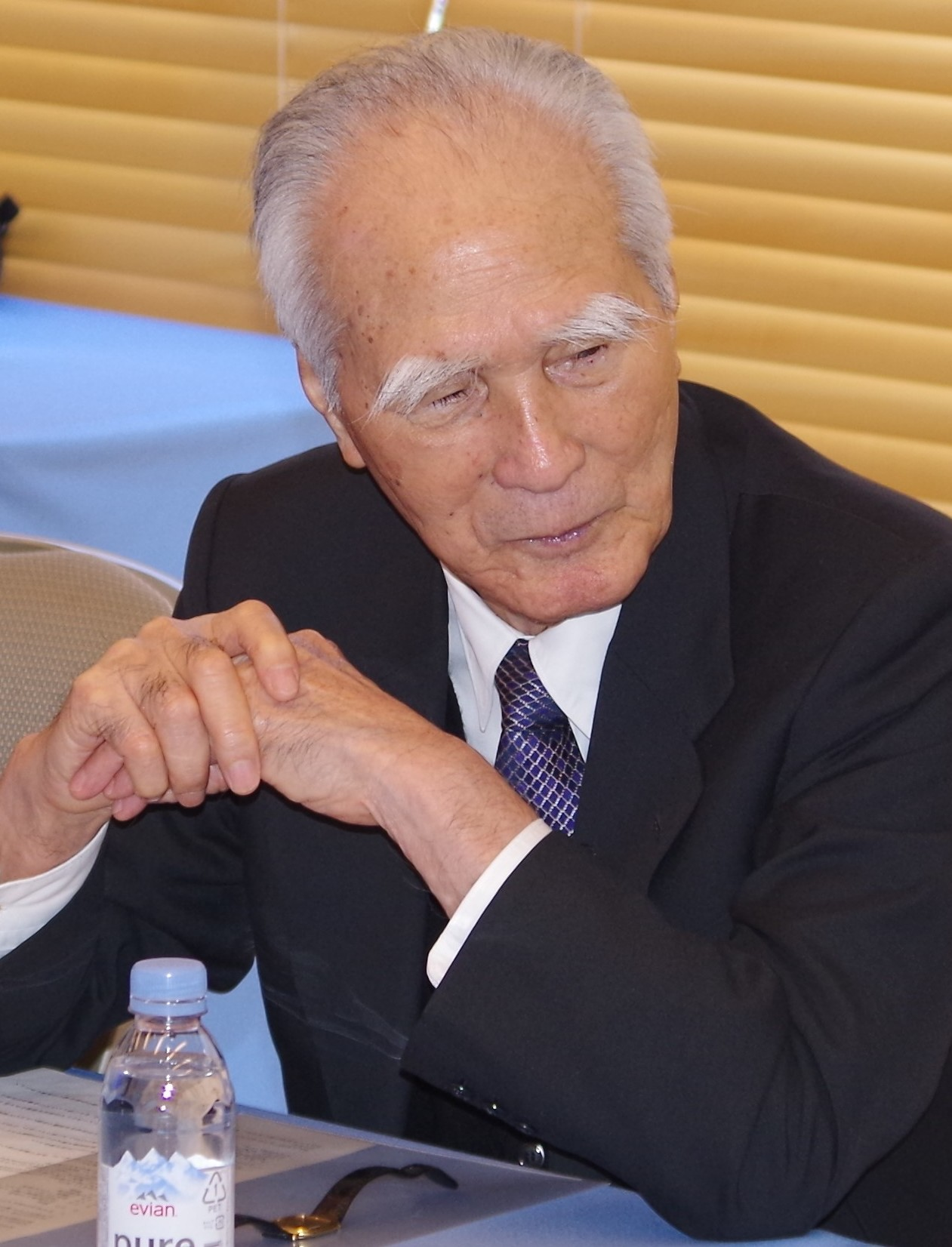 Murayama and Okabe